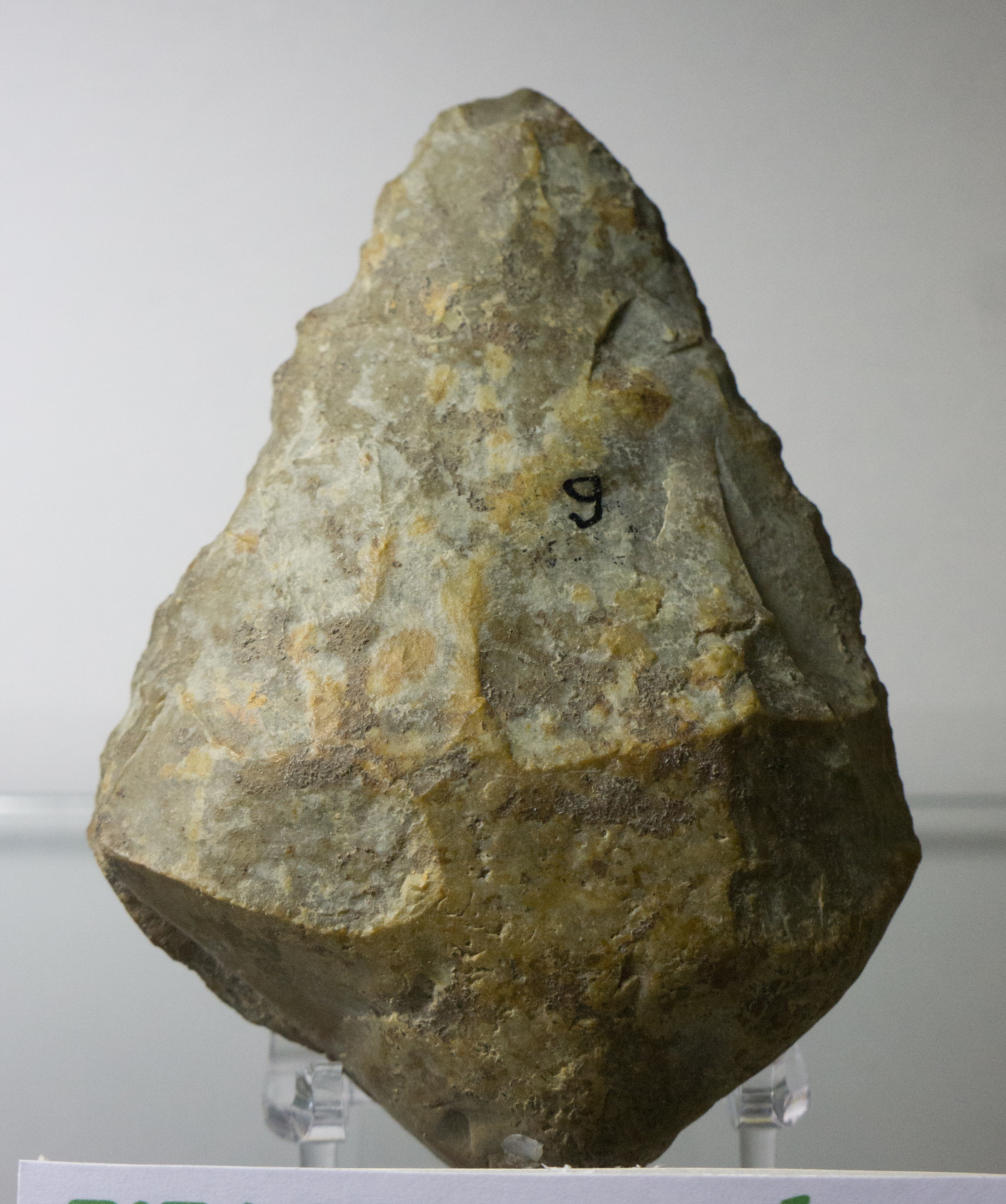 Chissey-les-Mâcon, Saône-et-Loire